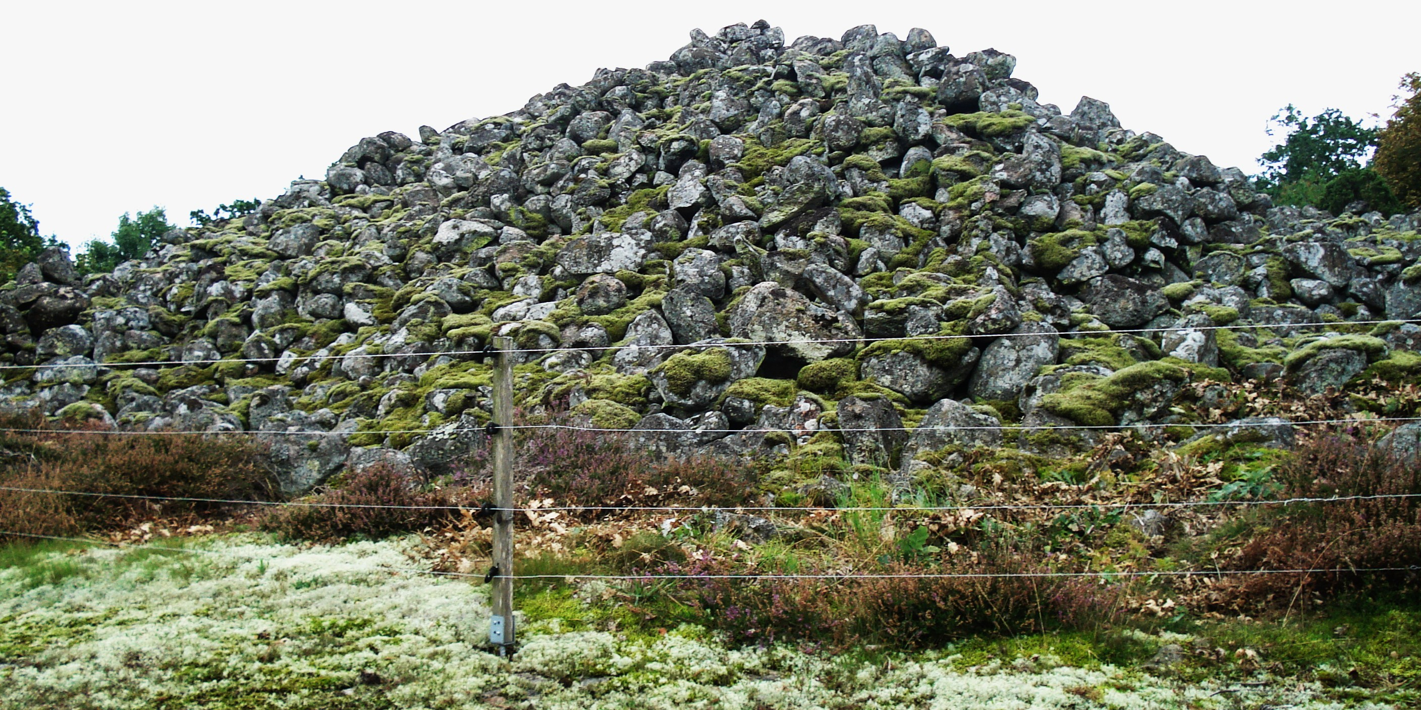 Röset på Målarberget (RAÄ-nr Edestad 32:1) i Edestads socken, Medelstads härad, Ronneby kommun, Blekinge, Sverige.